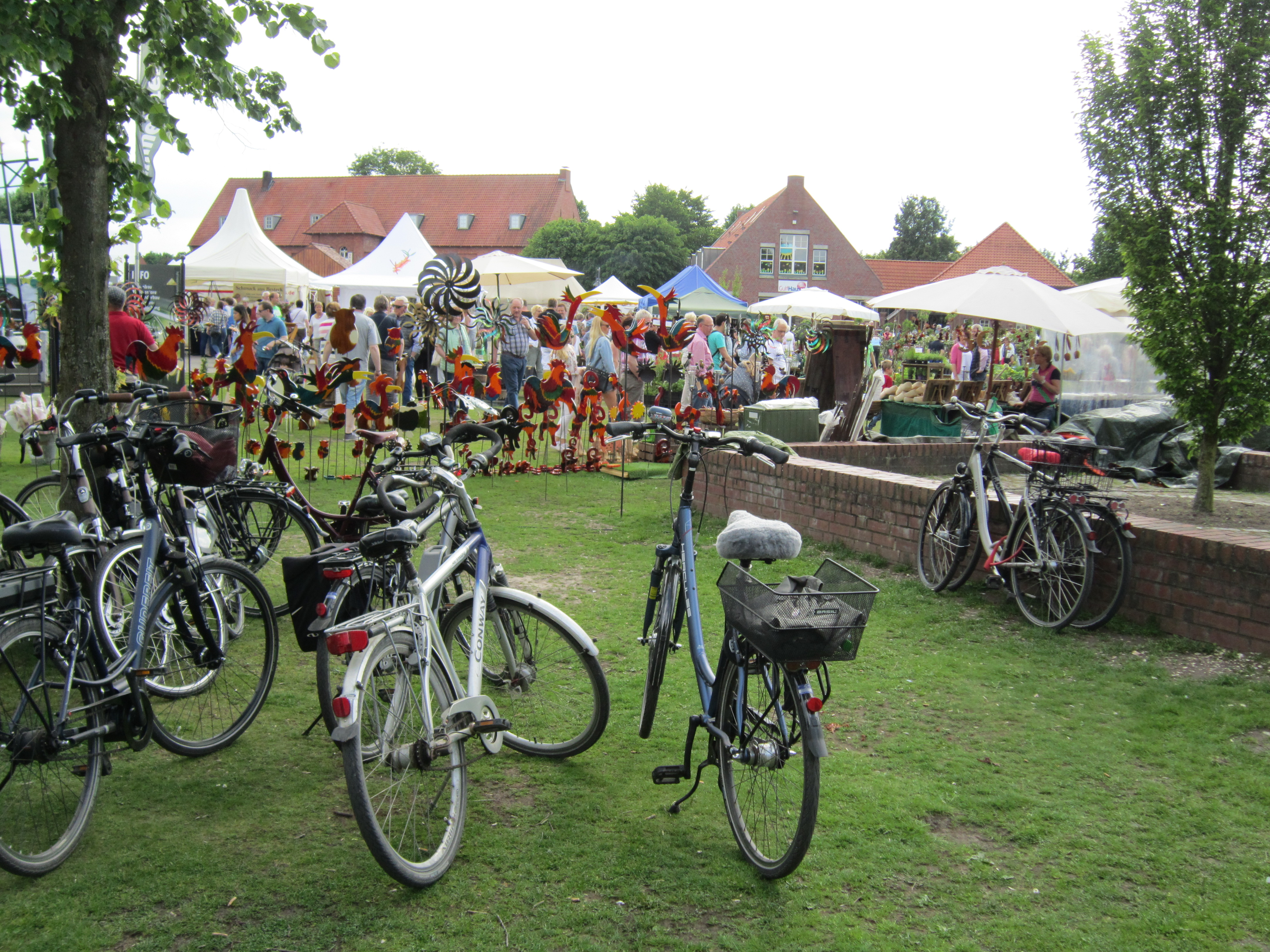 Landpartie "StadtgARTen" 2017 auf dem Gelände der Zitadelle Vechta. Hinten links das Zeughaus, hinten rechts das Gulfhaus